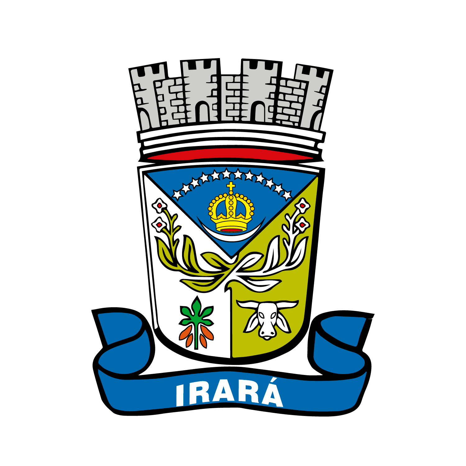 A coroa no triângulo é símbolo de poder de domínio e de município; o escudo samnítico é herança dos cânones portugueses. Ainda no triângulo, há uma meia lua e doze estrelas, símbolo heráldico da Nossa Senhora da Purificação, protetora e padroeira do município. Os ramos de fumo simbolizam a tradicional riqueza agrícola do município. Na base do escudo o pé de mandioca e a cabeça de touro atestam o valor da agricultura e a pecuária de Irará.